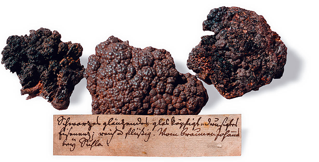 Historische Funde von schlackigem Brauneisenstein im Suhler Bergwerk Brauner Johannes (um 1780, Sammlung Naturhistorisches Museum Schloss Bertholdburg Schleusingen)